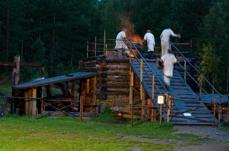 Uppsättning av träkol och malm på masugnen i kvällsmörker. Lapphyttans medeltida hyttområde, mulltimmerhyttan rekonstruerat så som det såg ut på 1300-talet. Motiv: Nya Lapphyttan Kategori: Historiespel/Gestaltning, Museum Uppsättning av träkol och malm på masugnen i kvällsmörker. Lapphyttans medeltida hyttområde, mulltimmerhyttan rekonstruerat så som det såg ut på 1300-talet.